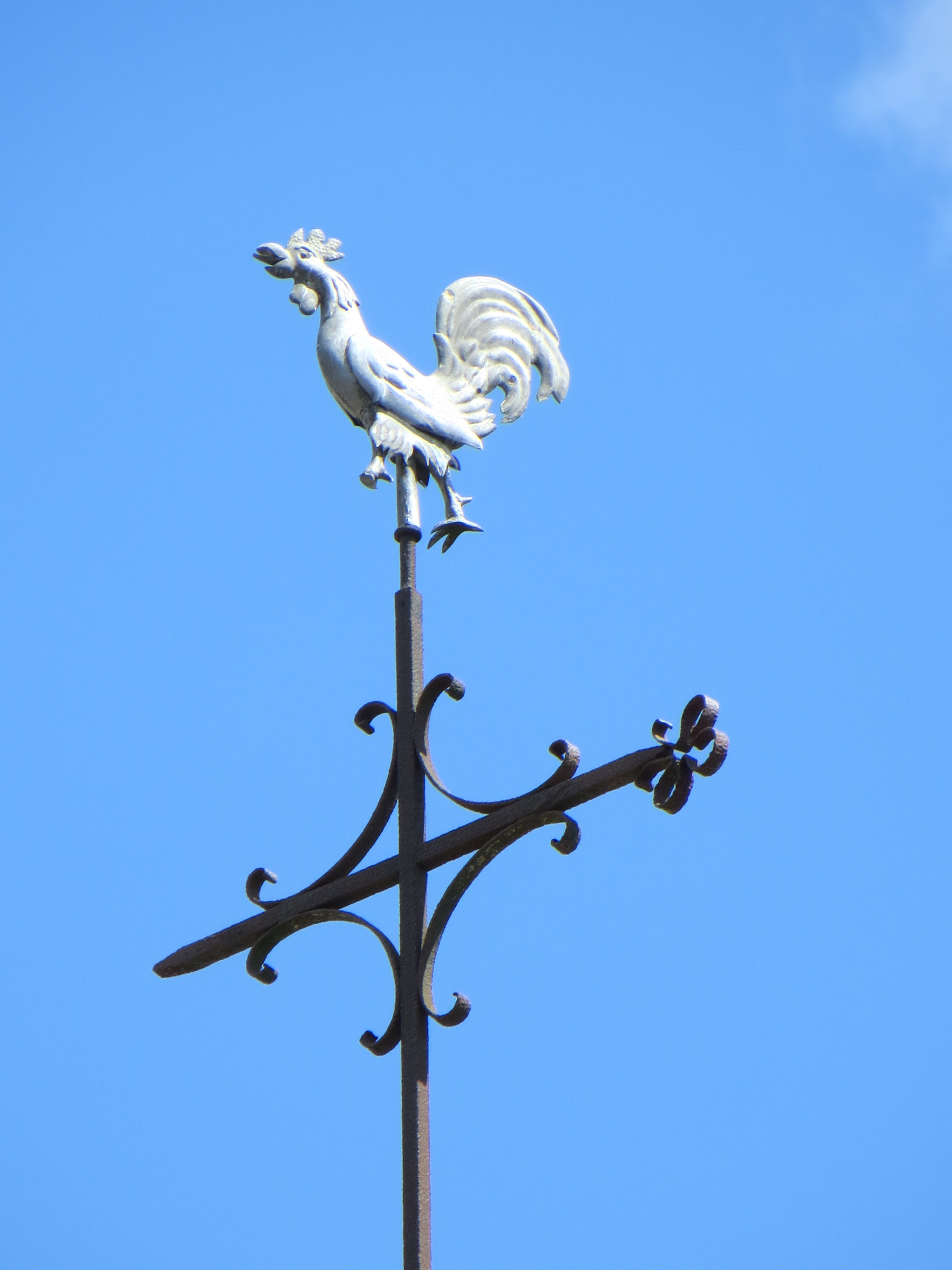 Coq de la flèche, ayant perdu une de ses pattes